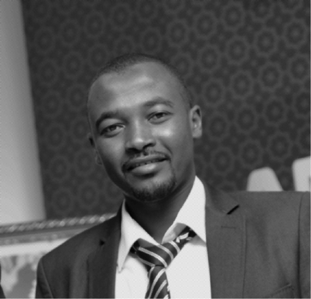 السيد : عبدالله عبدالكريم الأمين العام لجوائز جلوبال العالمية الرئيس التنفيذي لجلوبال دو تي جروب المغربية